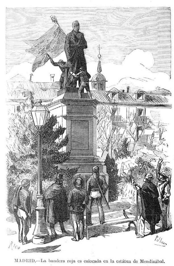 Madrid, la bandera roja es colocada en la estatua de Mendizábal, en la revista española La Ilustración Española y Americana.